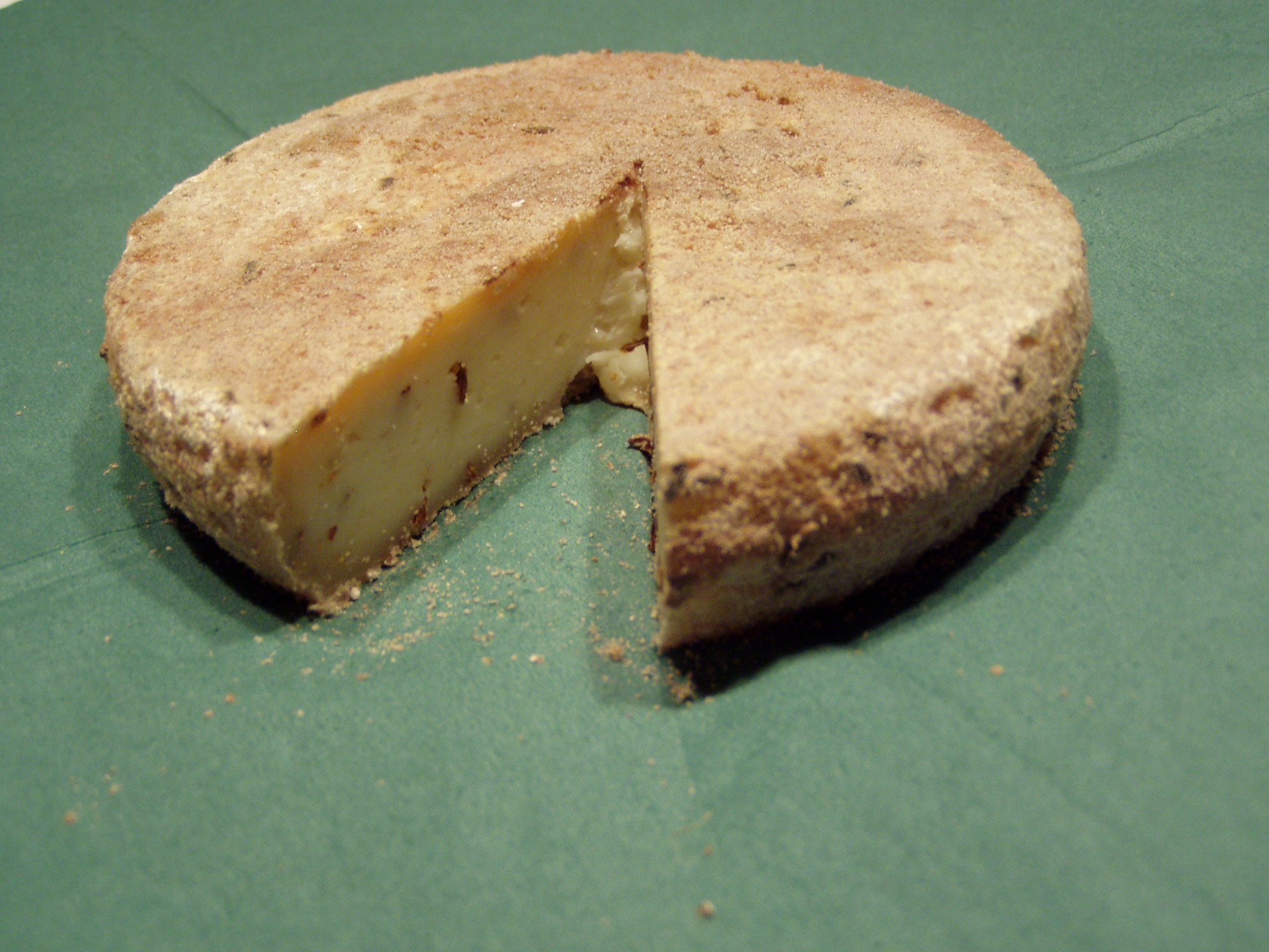 Ein Laib Milbenkäse.